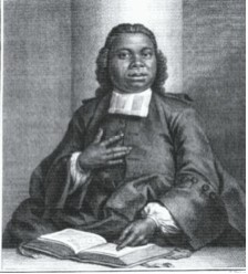 Dit is een 18e eeuwse prent zonder auteursrechten. Deze prent van Jacobus is een niet gesigneerde kopergravure van ongeveer 1745 (tenminste dat is de datering van het boek). Er is nog een andere prent van Jacobus, maar die is minder mooi.